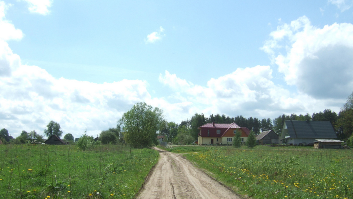 Ližiškių gyvenvietė